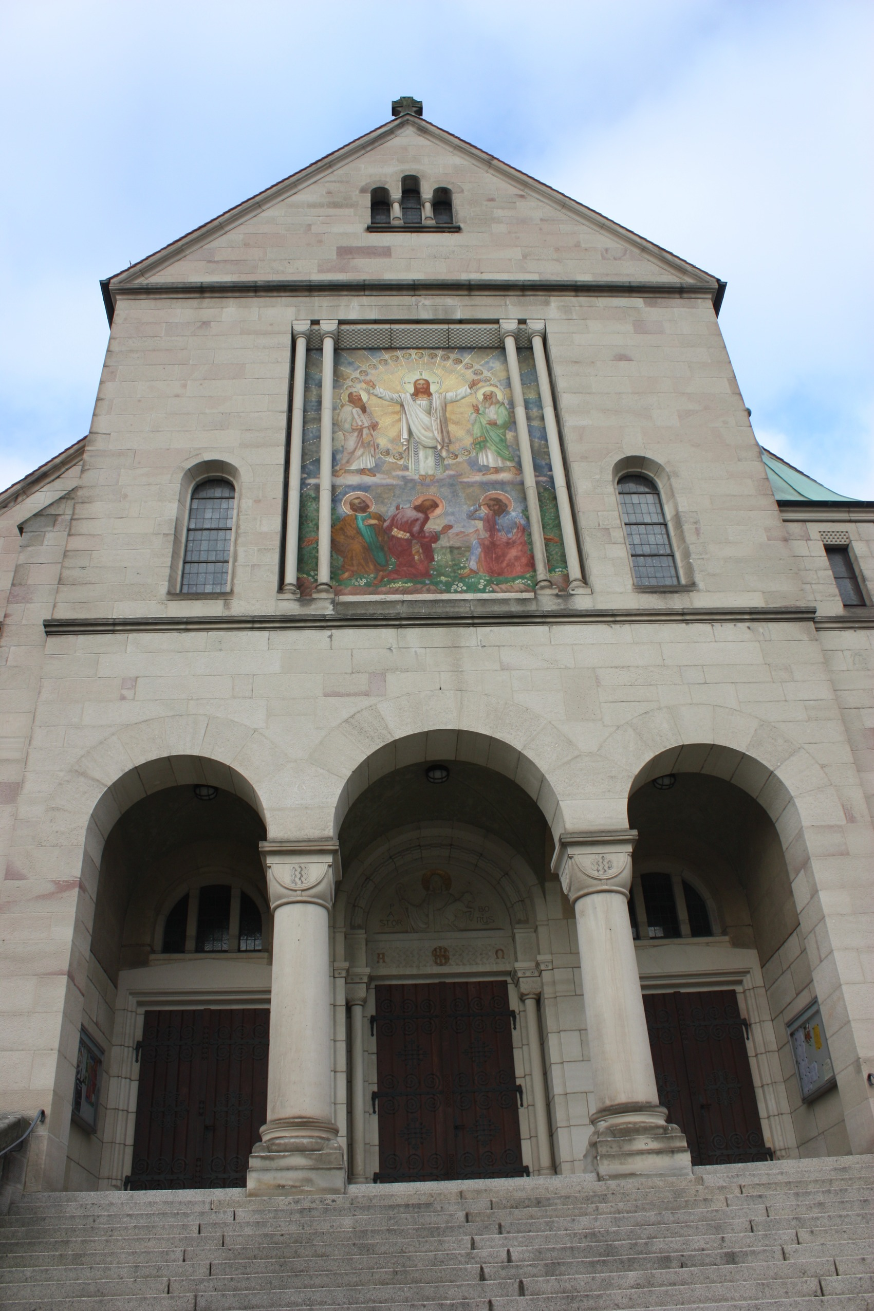 Eingang zur Herz-Jesu-Kirche